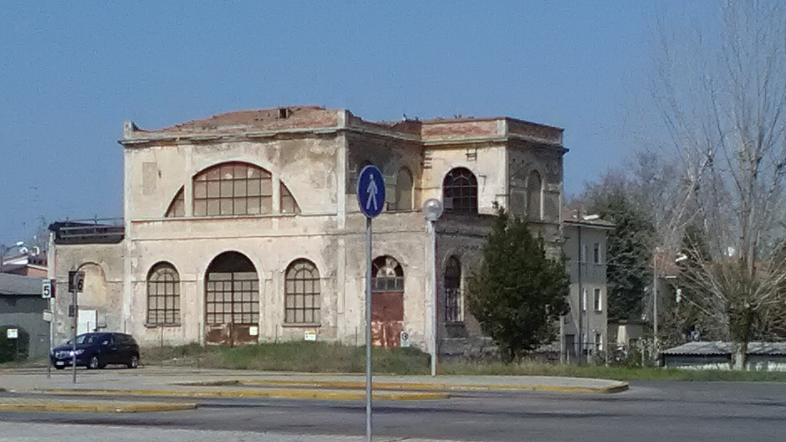 Centrale di trasformazione elettrica SEFTA a Mirandola